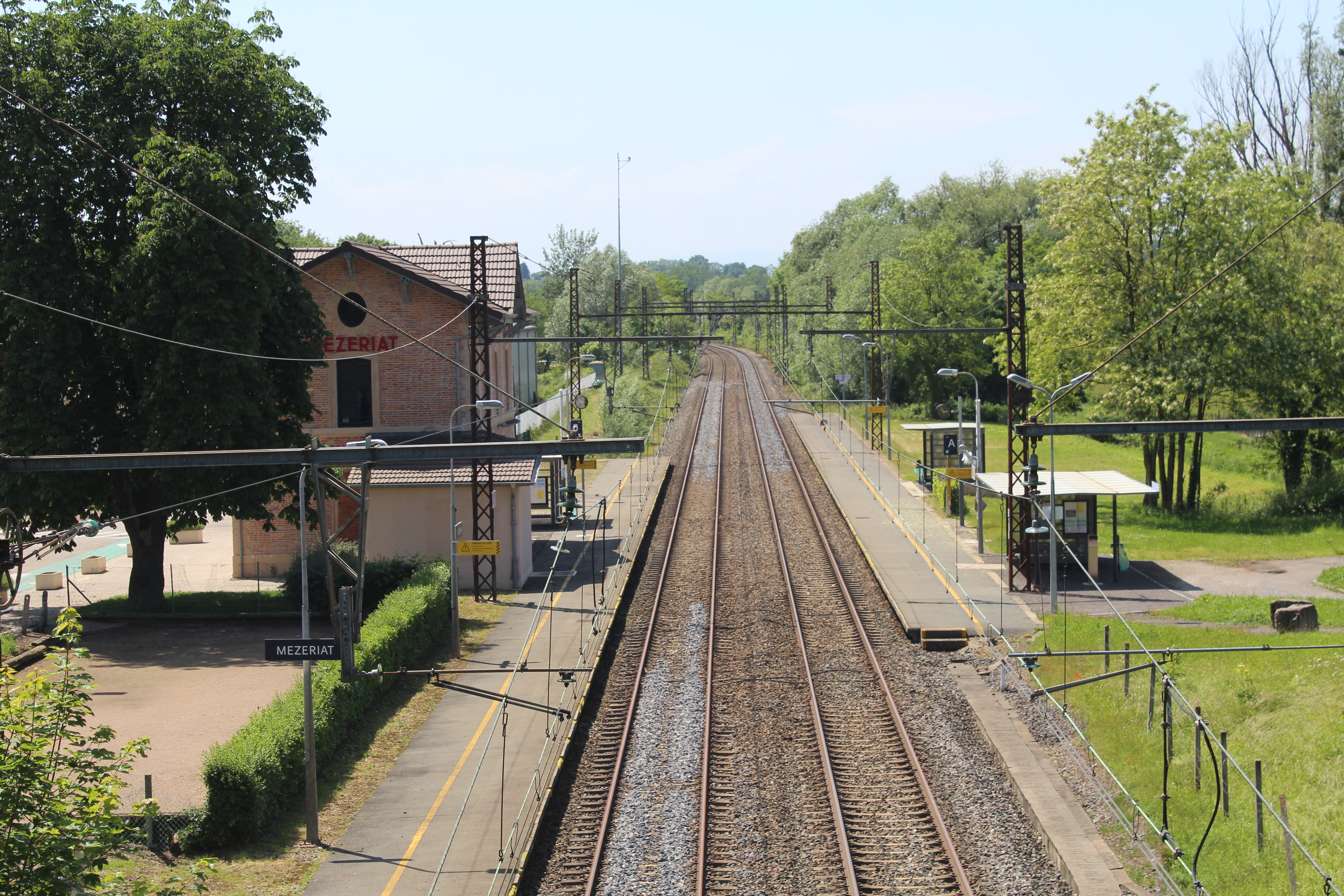 Vue générale sur la gare de Mézériat.